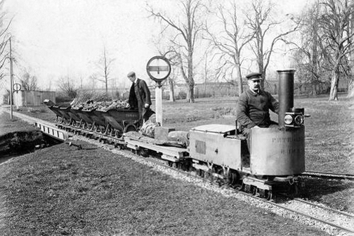 Blakesley Miniature Railway - Petrolia by Franz Otto Koch, 1900 - Originalaufnahme im Archiv von ullstein bild